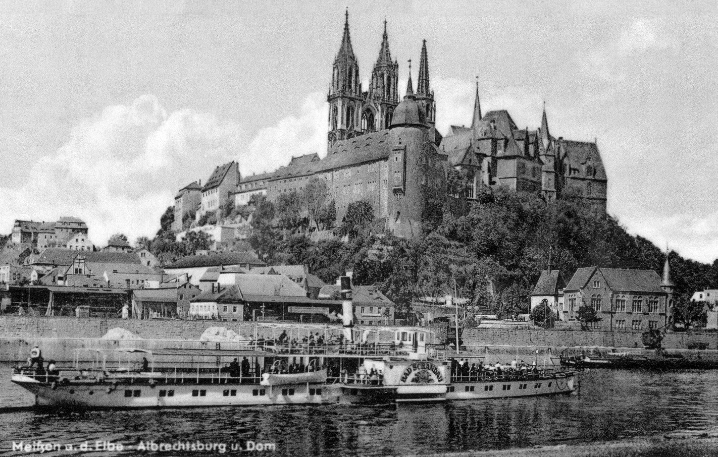 Meißen; Albrechtsburg und Dom - Elbe mit Dampfer Bad Schandau This postcard is from publisher Brück & Sohn in Meißen ( postcard has a unique number 28224 and is available in a higher resolution at the publisher. This images was uploaded in a cooperation project between Wikipedians and the publisher.